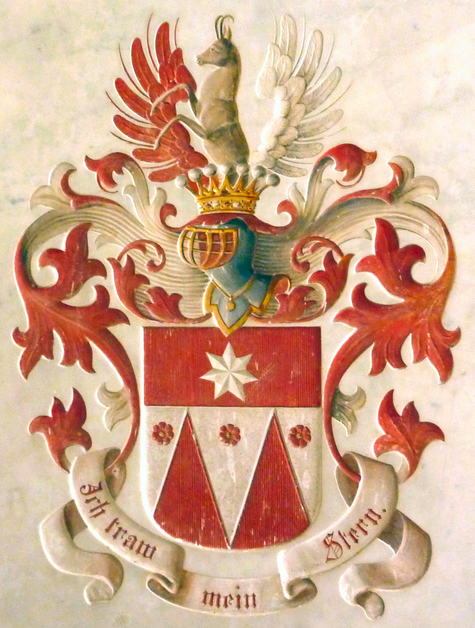 Evangelisch-lutherische Dreifaltigkeitskirche in Haunsheim, einer Gemeinde im Landkreis Dillingen an der Donau (Bayern), Epitaph (Ausschnitt), Wappen der Familie Hauch mit der Devise: Ich traw mein Stern